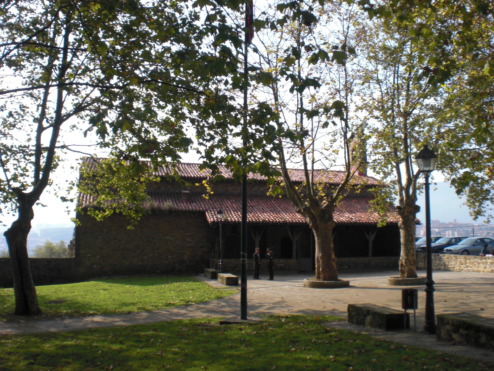 Leioako Ondizko baseliza.